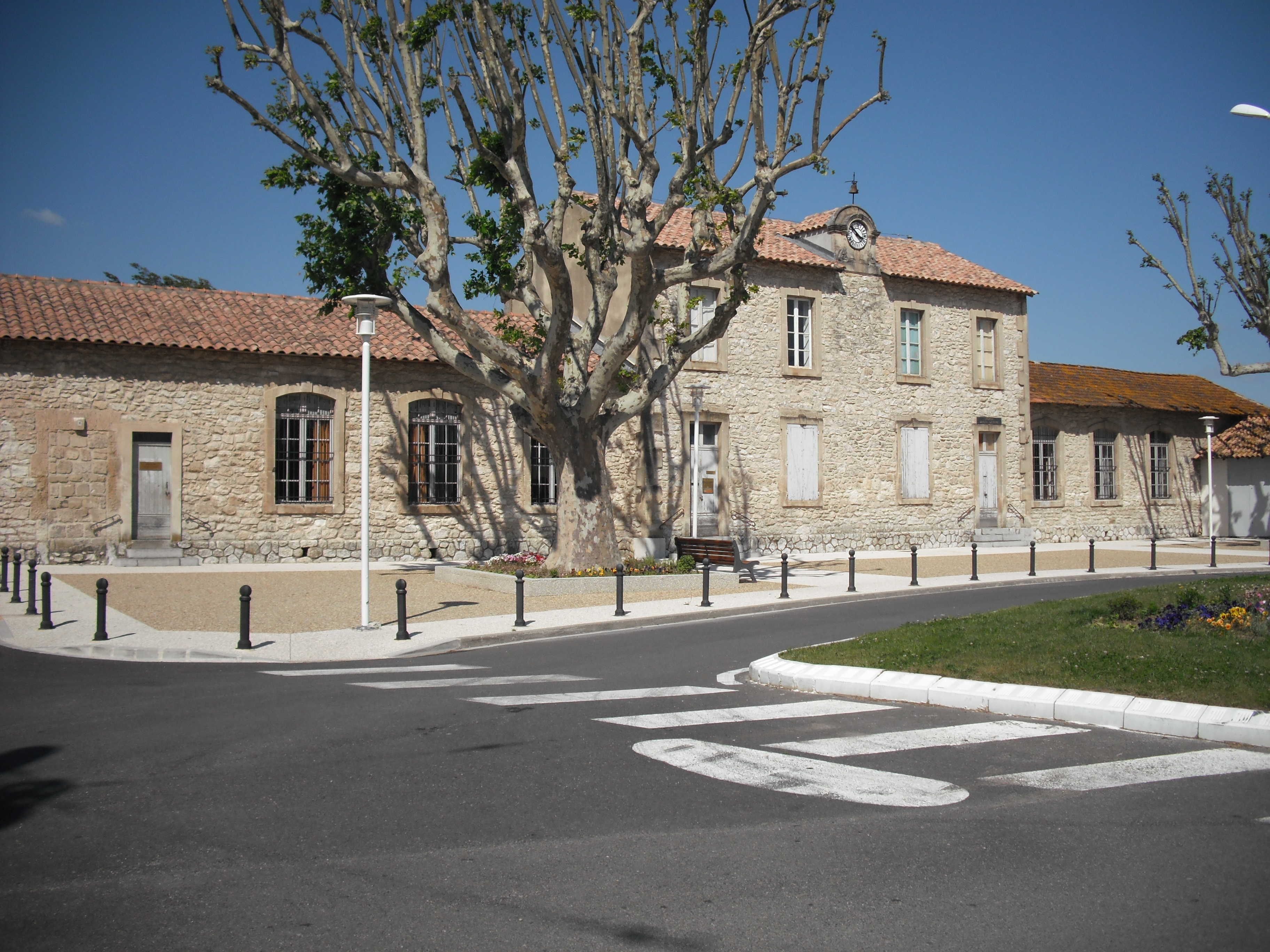 Ancien groupe scolaire de Mas-Thibert (commune d'Arles), place Michel-Reboul.